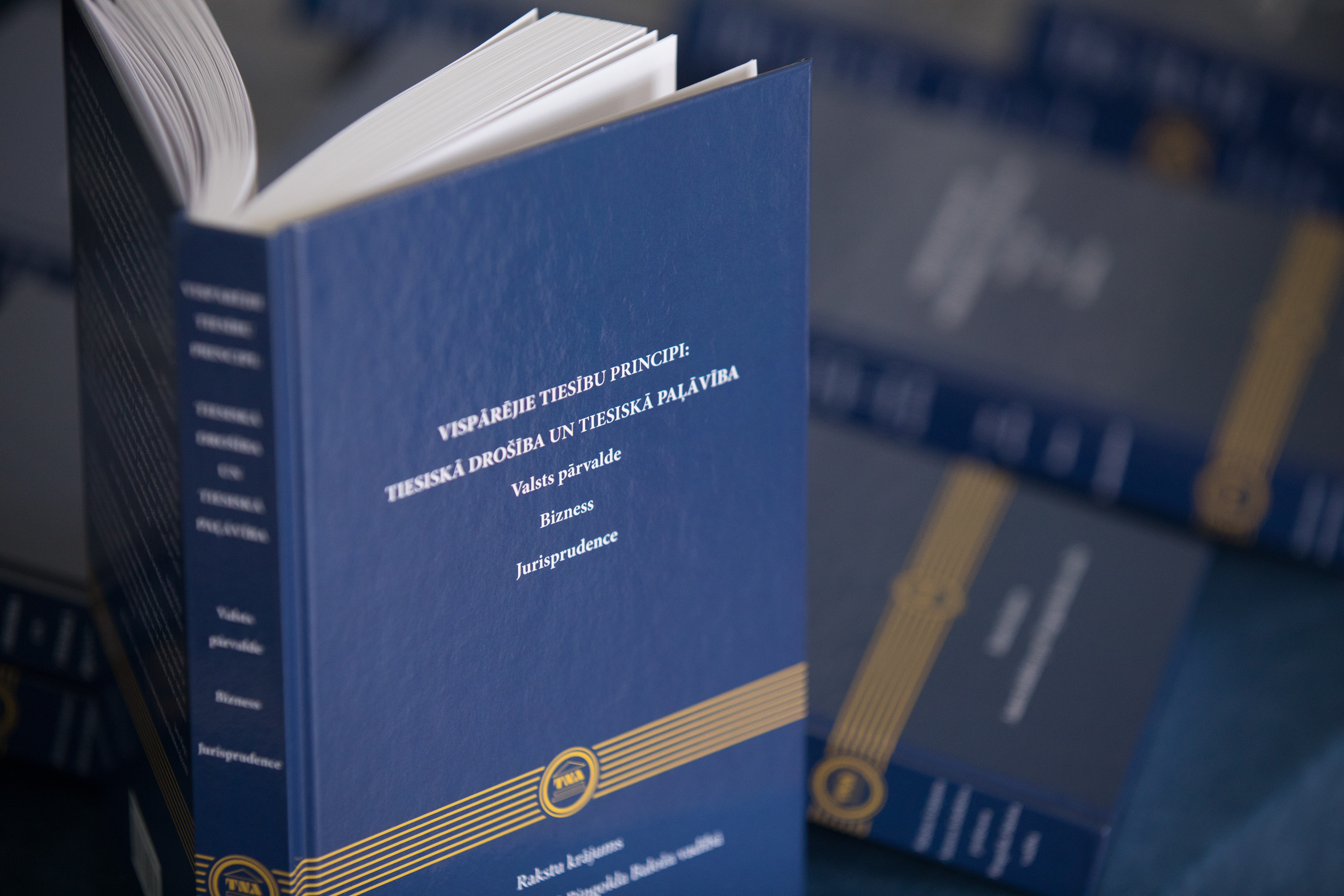 Grāmata „Vispārējie tiesību principi: tiesiskā drošība un tiesiskā paļāvība”